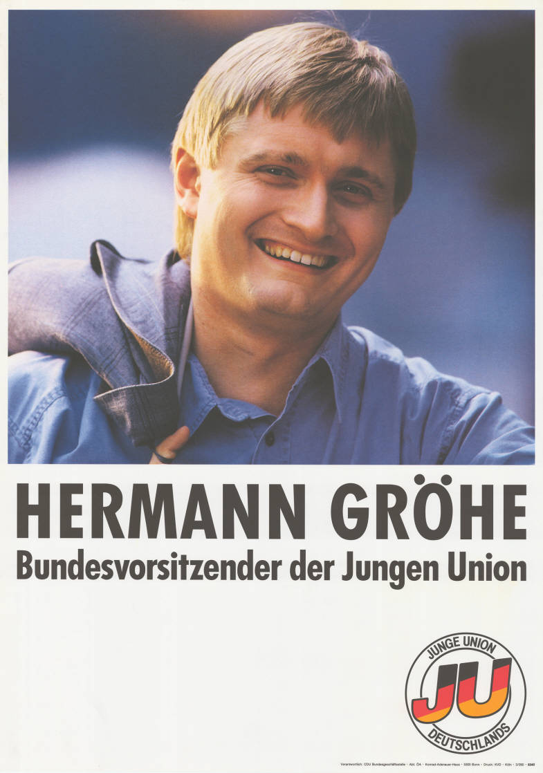 Hermann Gröhe Bundesvorsitzender der Jungen Union Junge Union DeutschlandsAbbildung:PorträtfotoPlakatart:Kandidaten-/Personenplakat mit PorträtAuftraggeber:Verantw.: CDU-Bundesgeschäftsstelle, Abt. Öffentlichkeitsarbeit, Konrad-Adenauer-Haus, BonnDrucker_Druckart_Druckort:KVD, KölnObjekt-Signatur:10-028 : 282Bestand:Plakate von Jugendorganisationen der Parteien ( 10-028)GliederungBestand10-18:Plakate von Jugendorganisationen der Parteien (10-028) » CDU » Personen- und KandidatenplakateLizenz:KAS/ACDP 10-028 : 282 CC-BY-SA 3.0 DE